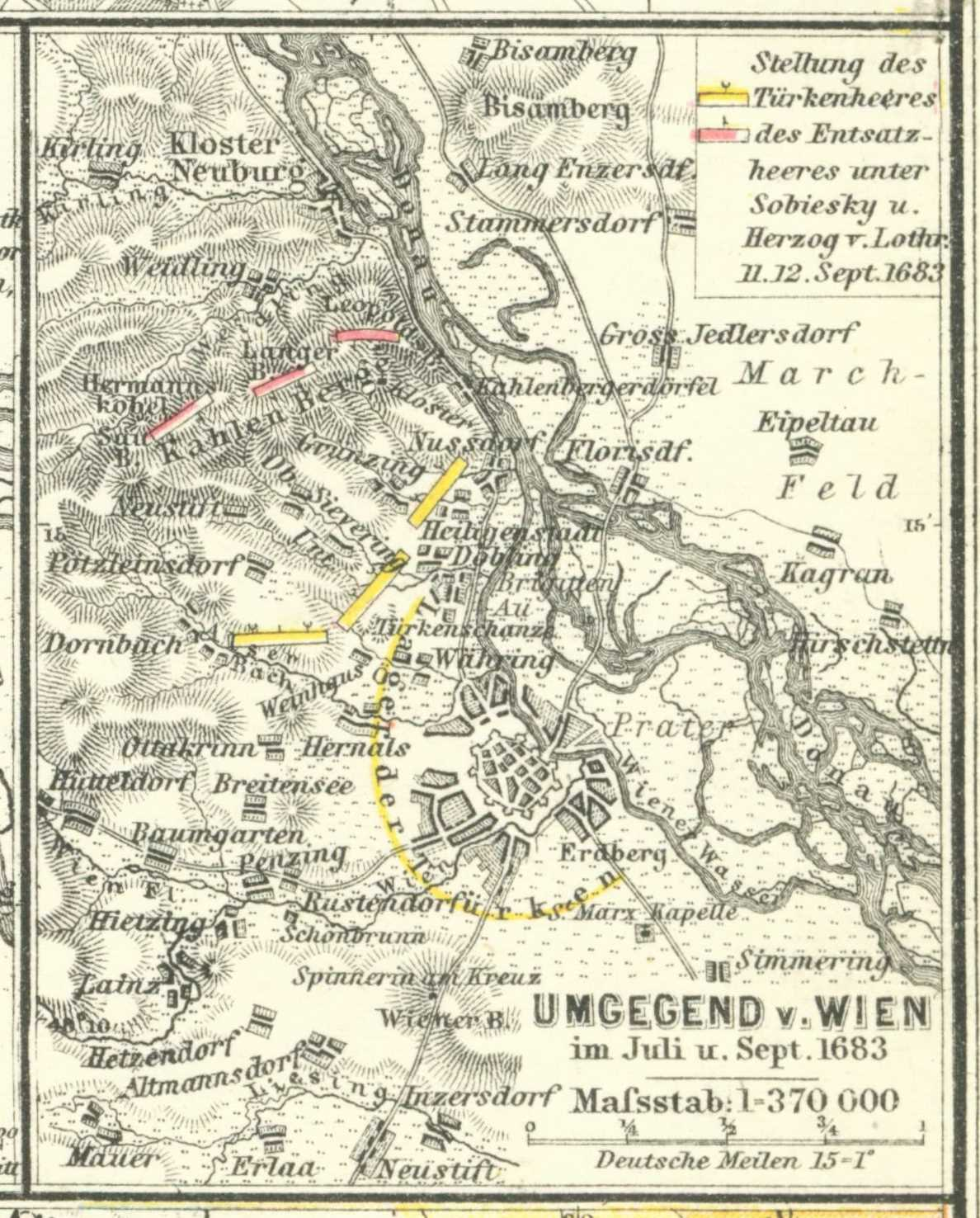 Belagerung von Wien 11. und 12. September 1683